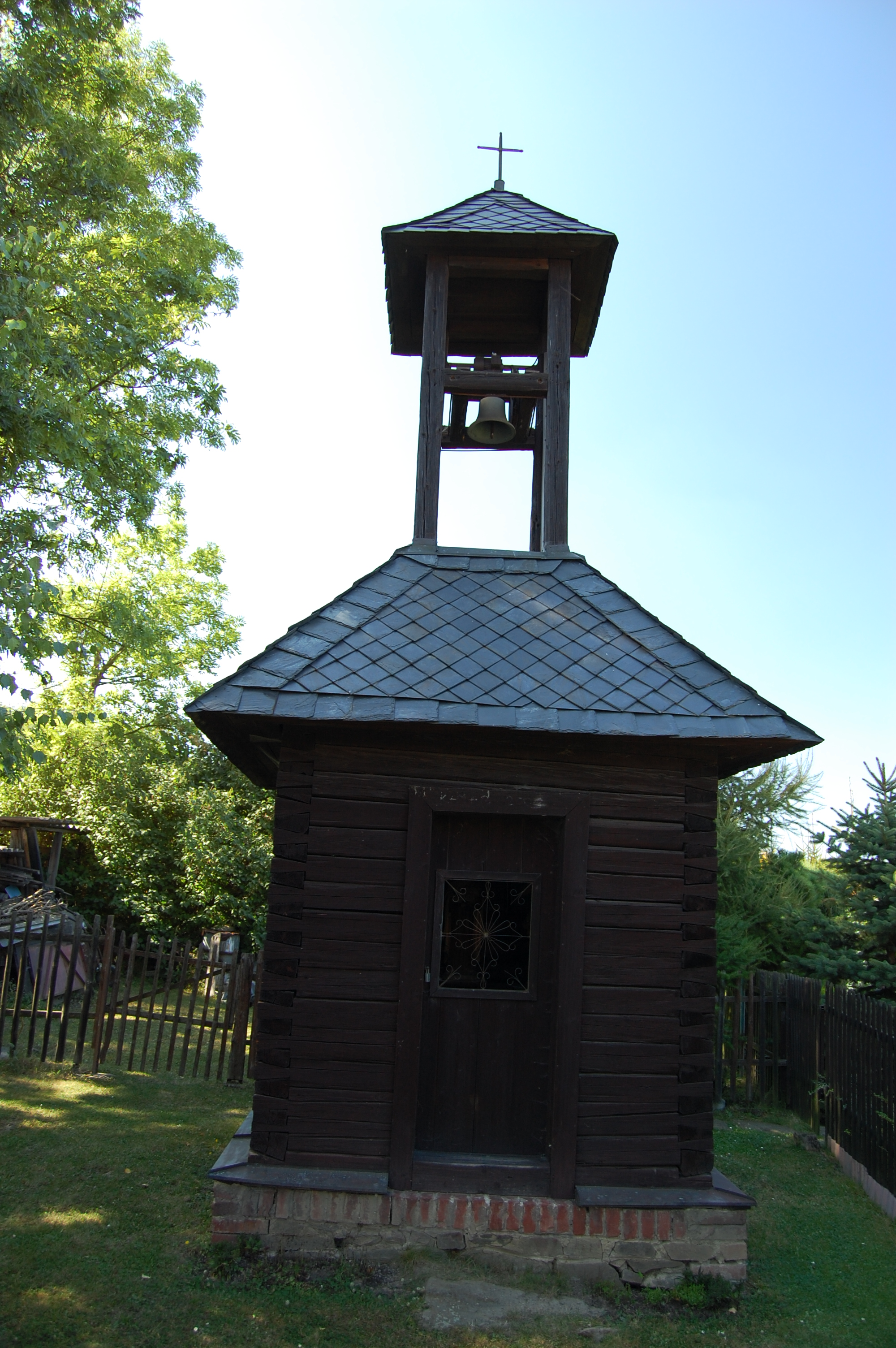 Kaplička v Chobyni, Šubířov, okres Prostějov